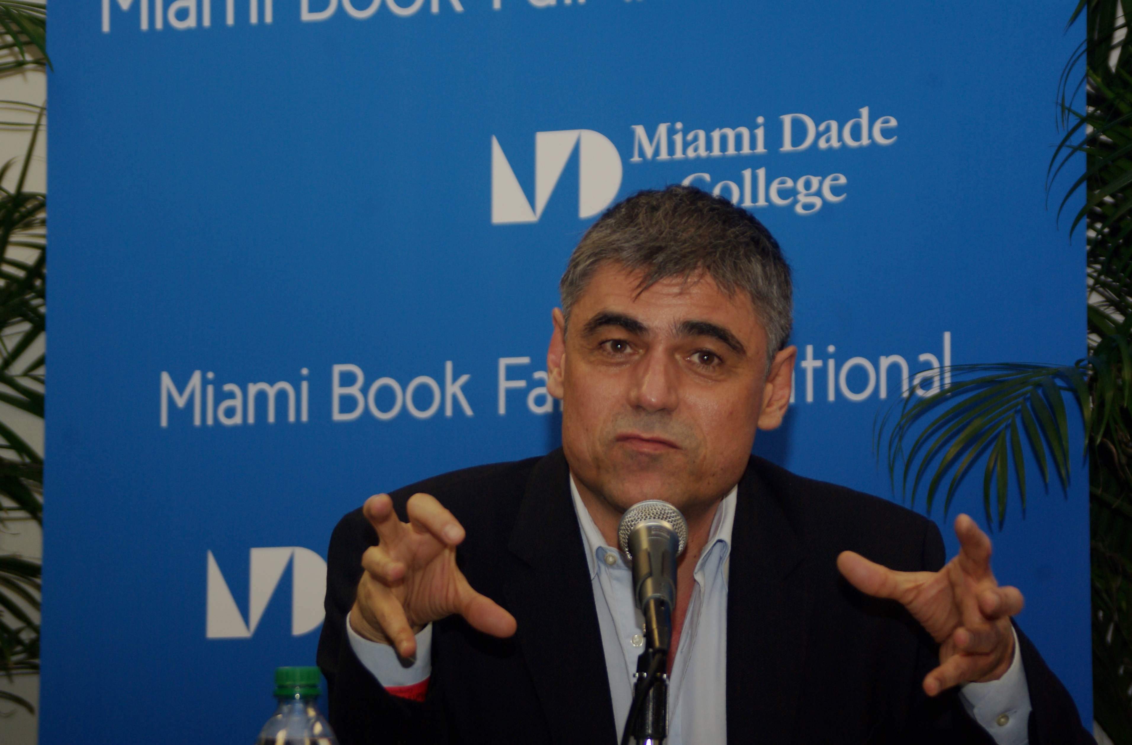 El escritor chileno Pablo Simonetti en la Feria Internacional del Libro de Miami, 2014